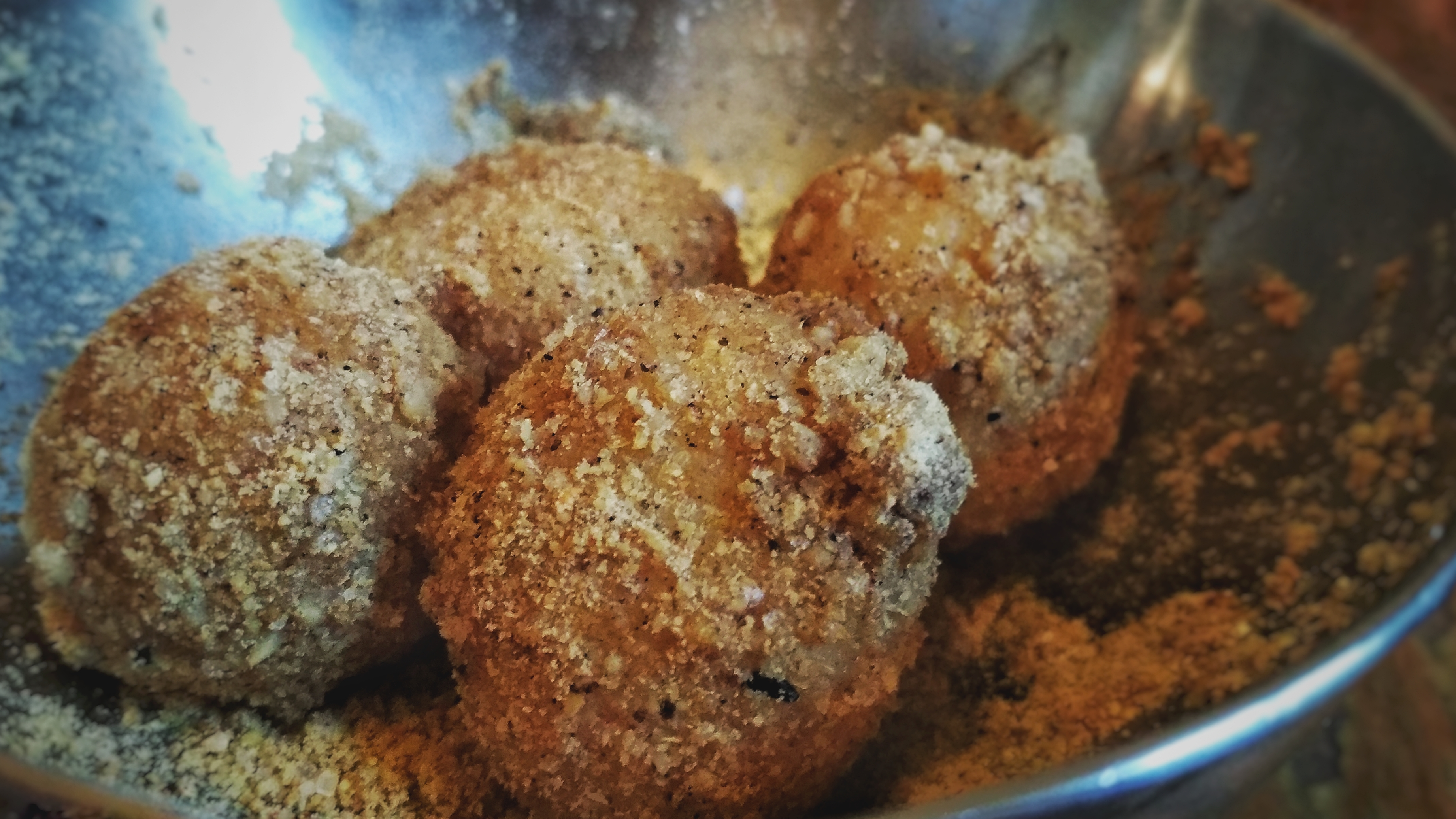 裹上花生粉的（米时）